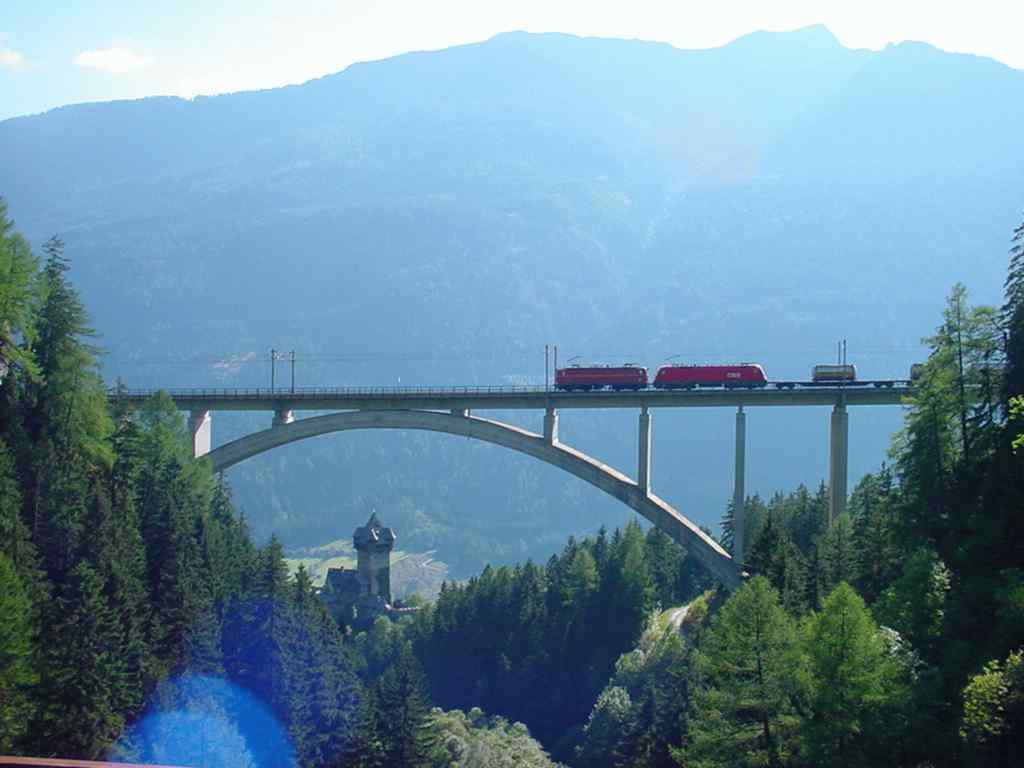 Die Burg Falkenstein im Mölltat mit der Falkensteinbrücke der Tauernbahn